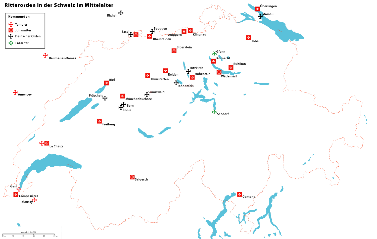 Kommenden der Ritterorden der Johanniter/Malteser, Templer und des Deutschen Ordens in der Schweiz im Mittelalter